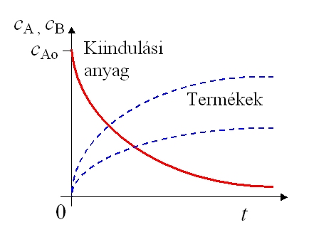 A koncentráció időbeli változása elsőrendű reakció esetén